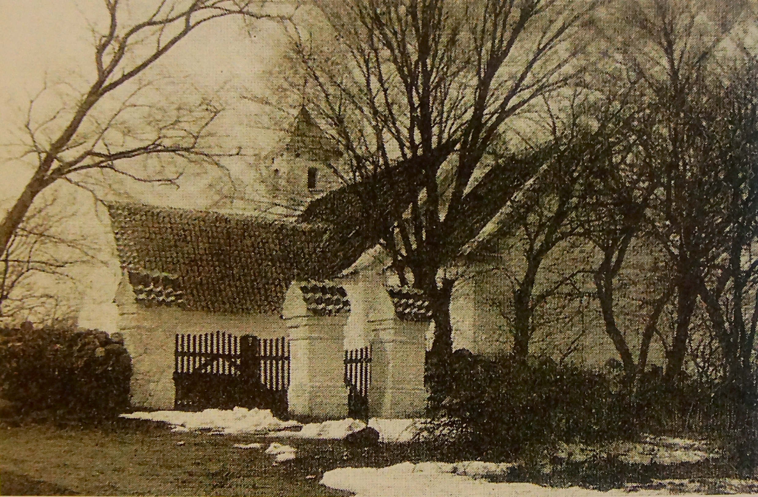 Rolsø Kirke